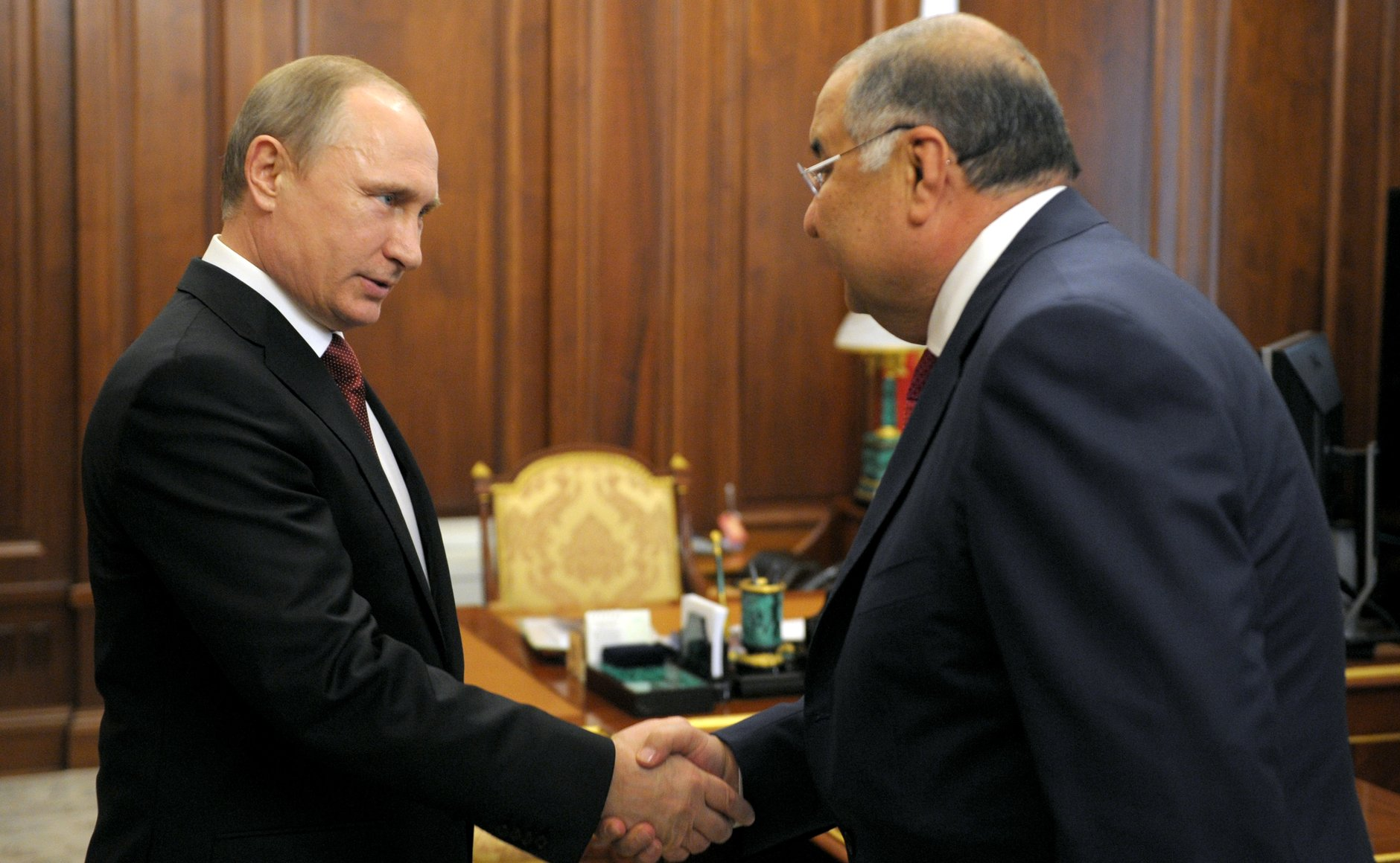 Встреча Владимира Путина с Алишером Усмановым